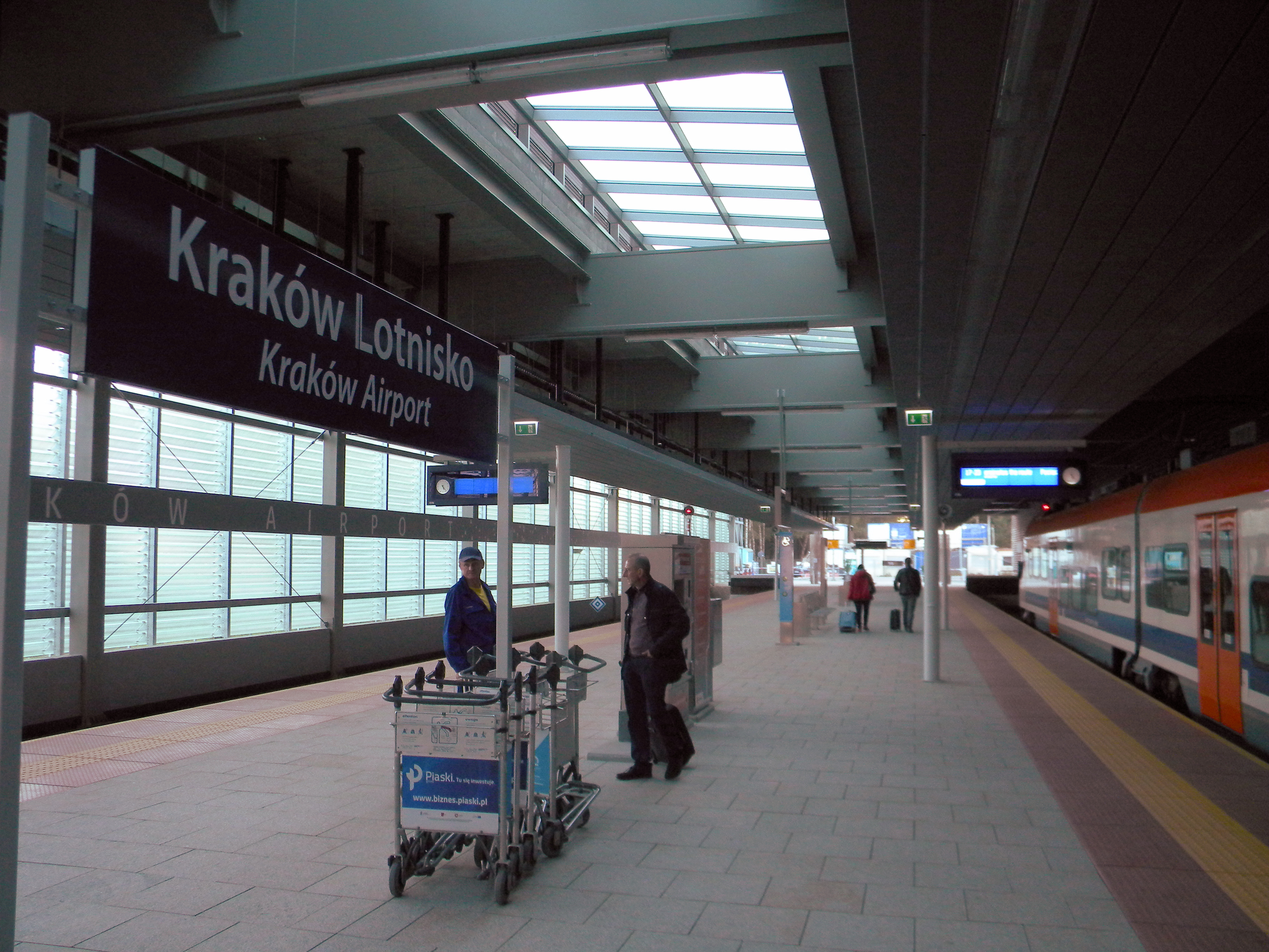 Peron przystanku kolejowego na lotnisku w Balicach